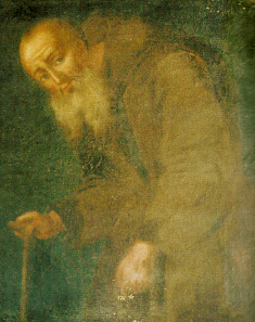 Frate Francesco Cascio, servo di Dio